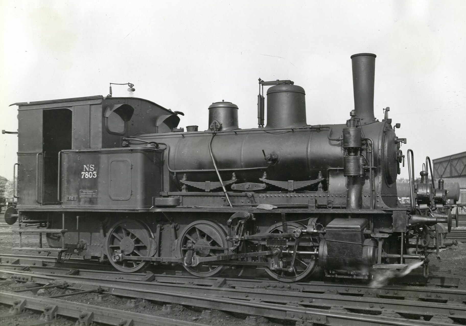 Afbeelding van de stoomlocomotief nr. 7803 (serie 7800) van de N.S. afkomstig van de S.B.B. op het emplacement te Rotterdam Feyenoord.